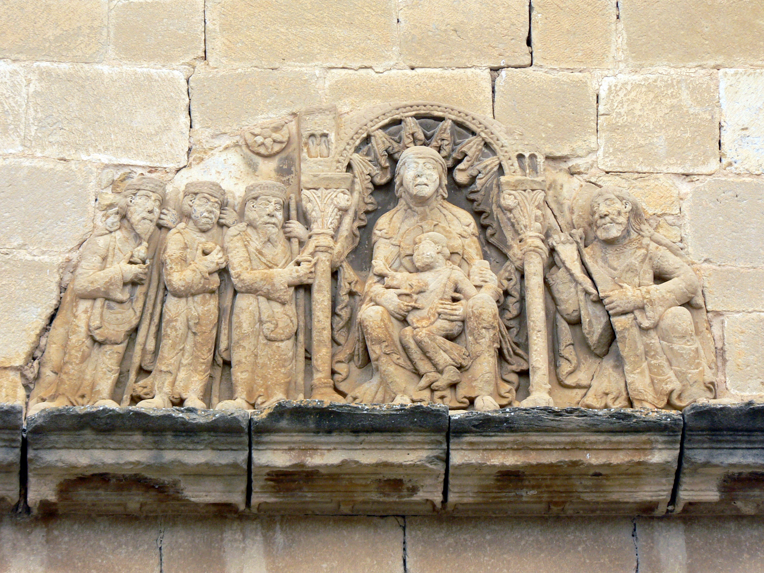 Ilesia de Santa María d'Uncastiello: repui de l'antiga portalada romanica (Zinco Billas, Aragón).